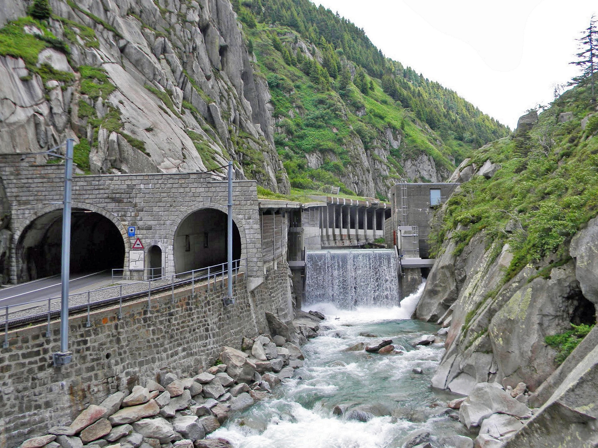 Urnerloch Nordportal mit Schöllenenbahn und Reuss